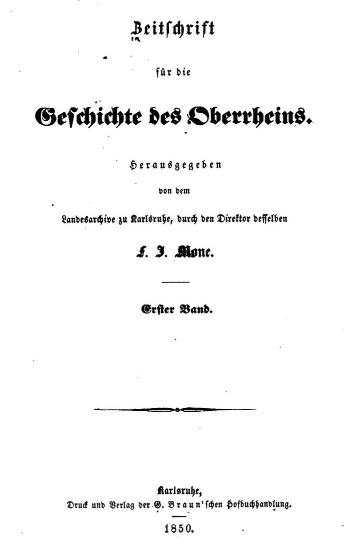 Cover der ersten Ausgabe der Zeitschrift für die Geschichte des Oberrheins